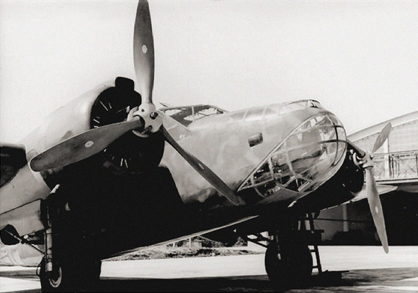 Caproni Ca.155 con i motori Piaggio XI Categoria:Immagini di aeroplani